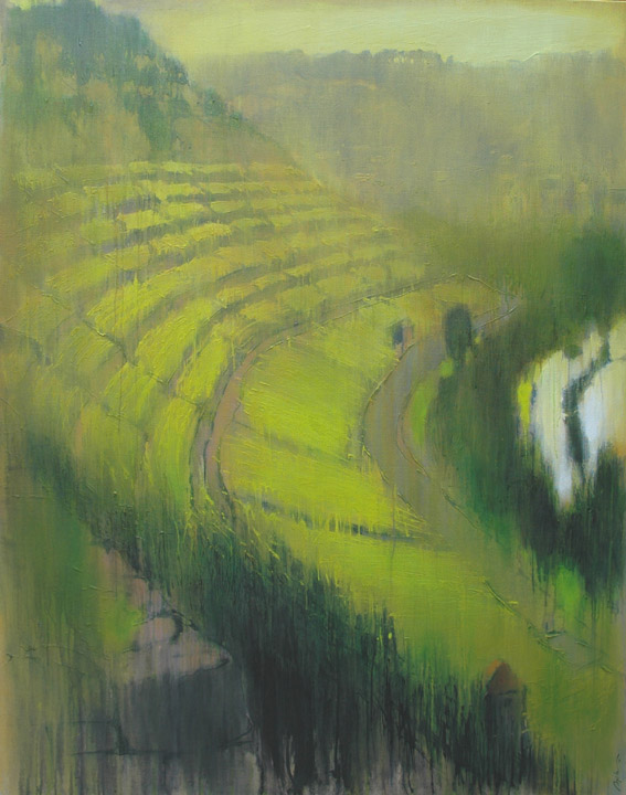 Homburger Kallmuth aus der Gemäldeserie "13" (Deutsche Weinanbaugebiete), jedes Werk ist 130 cm breit und 165 cm hoch.